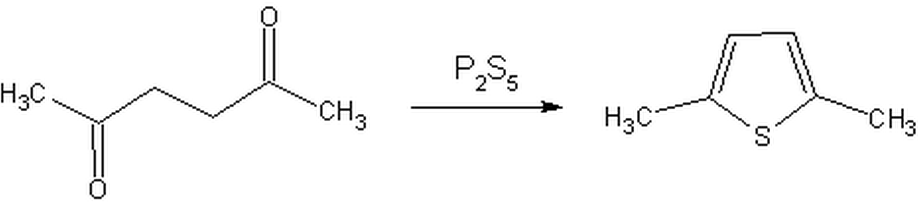 Добування похідного тіофену